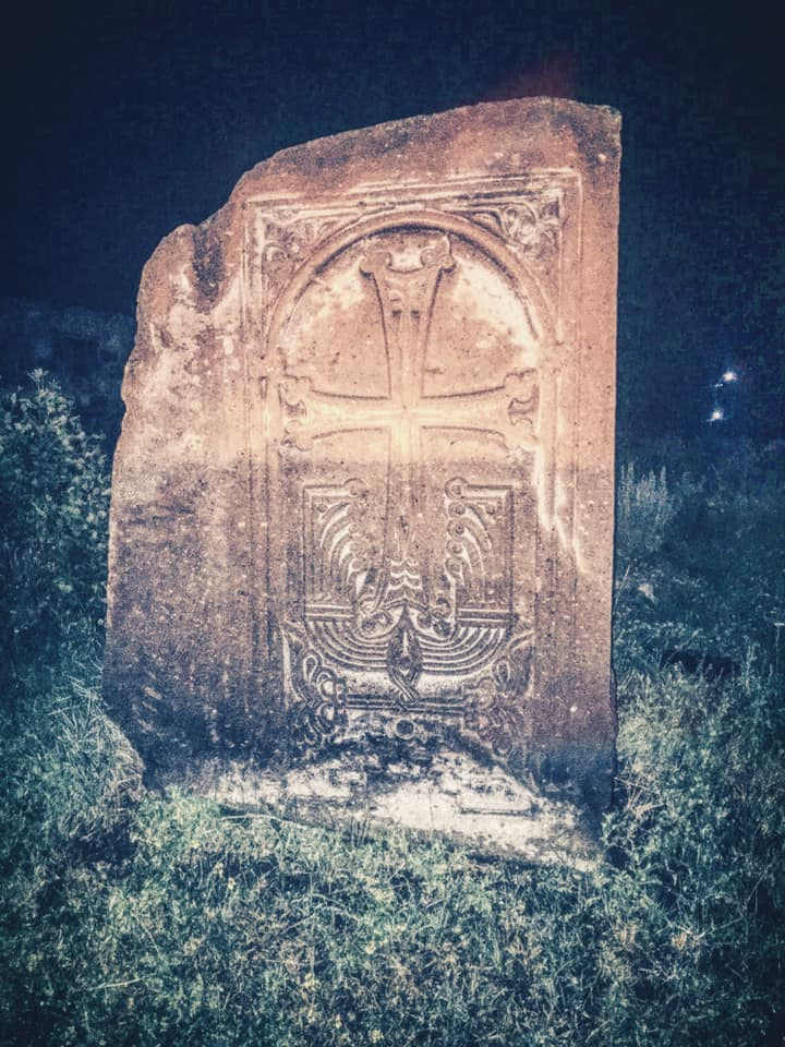 Խաչքարը գտնվում է Մելիքգյուղում